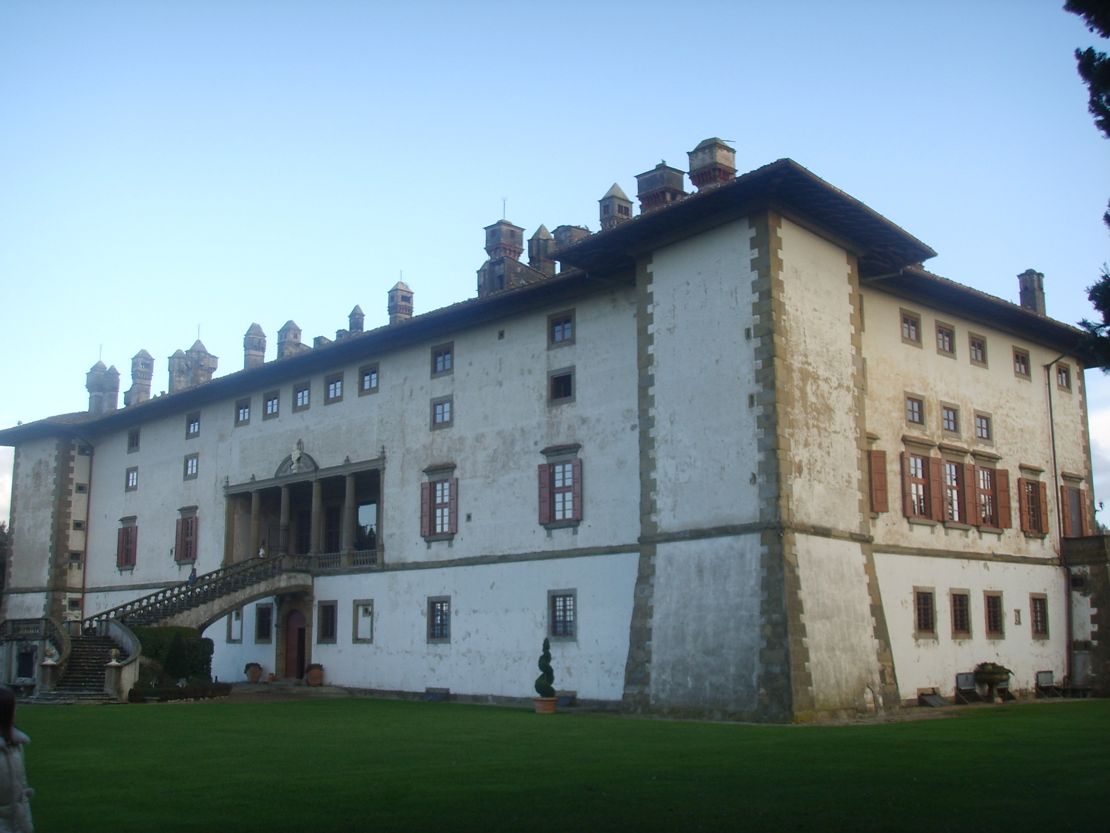 Villa_di_Artimino Medici villa in Artimino